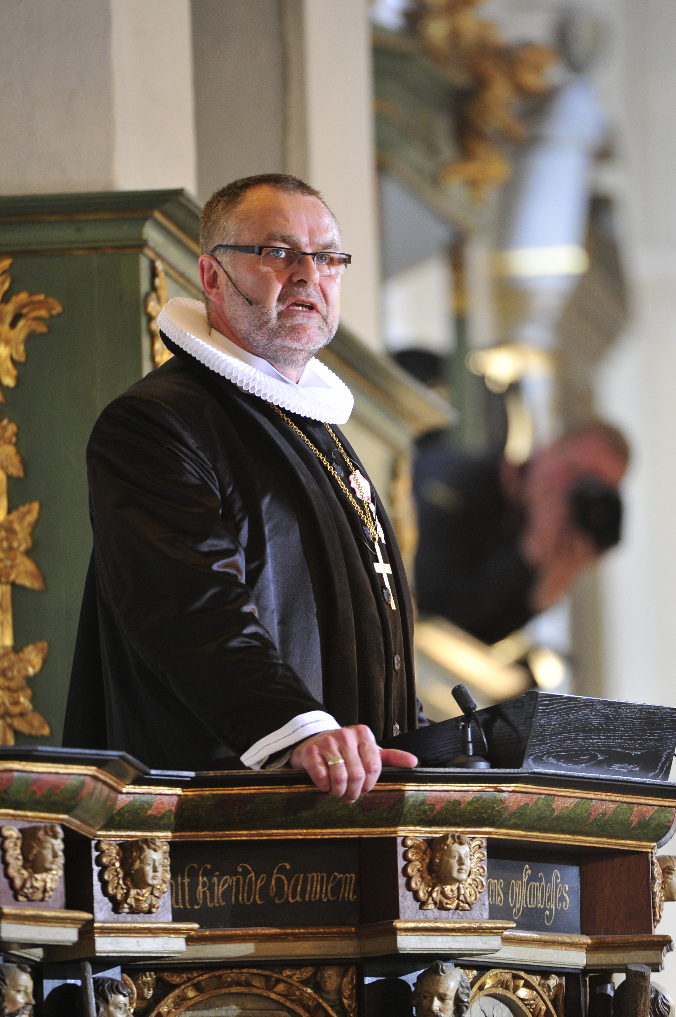 Henning Toft Bro prædiker under sin bispevielse i Budolfi Kirke i Aalborg.